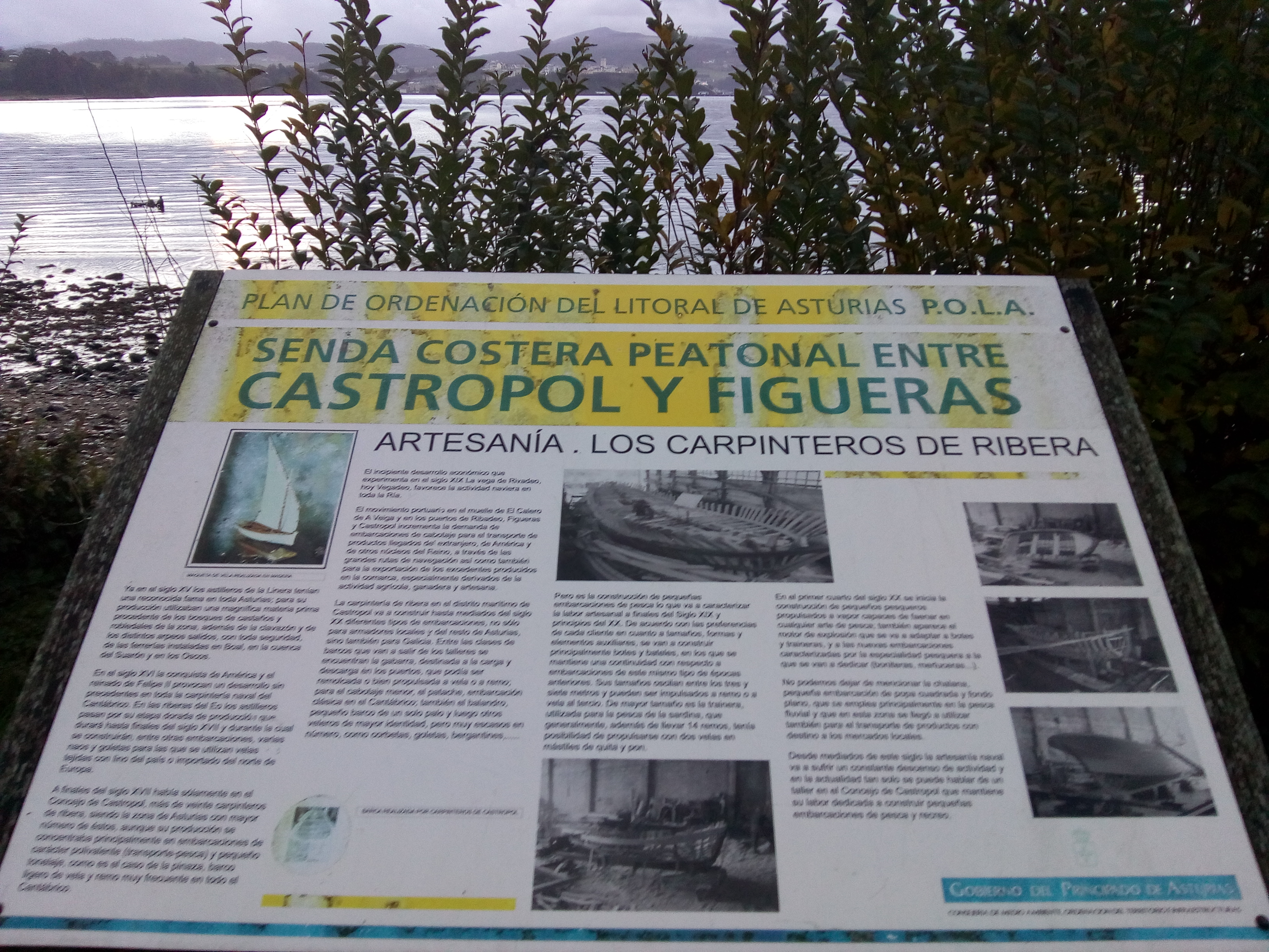 Ruta costeira peonil entre Castropol e As Figueiras. Panel na Lieira coa ría de Ribadeo ó fondo